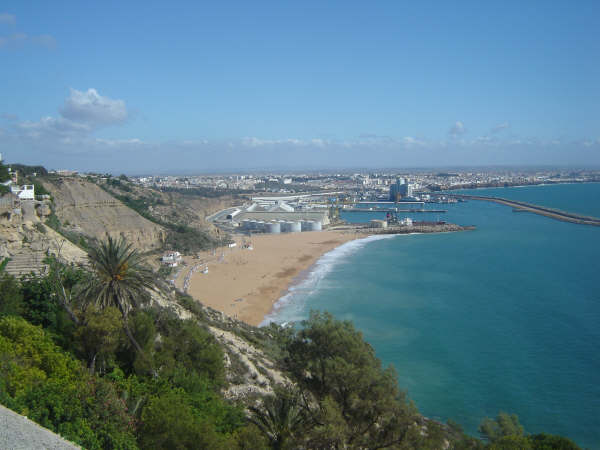 Petite plage située à proximité de la ville. Plage connue pour sa fameuse vague de surf, classée parmi les dix premières au niveau mondial.